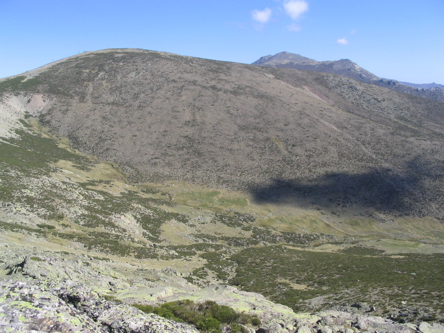 Ventisquero de la Condesa. Es la ladera sureste de la Bola del Mundo, lugar donde nace el río Manzanares (España).